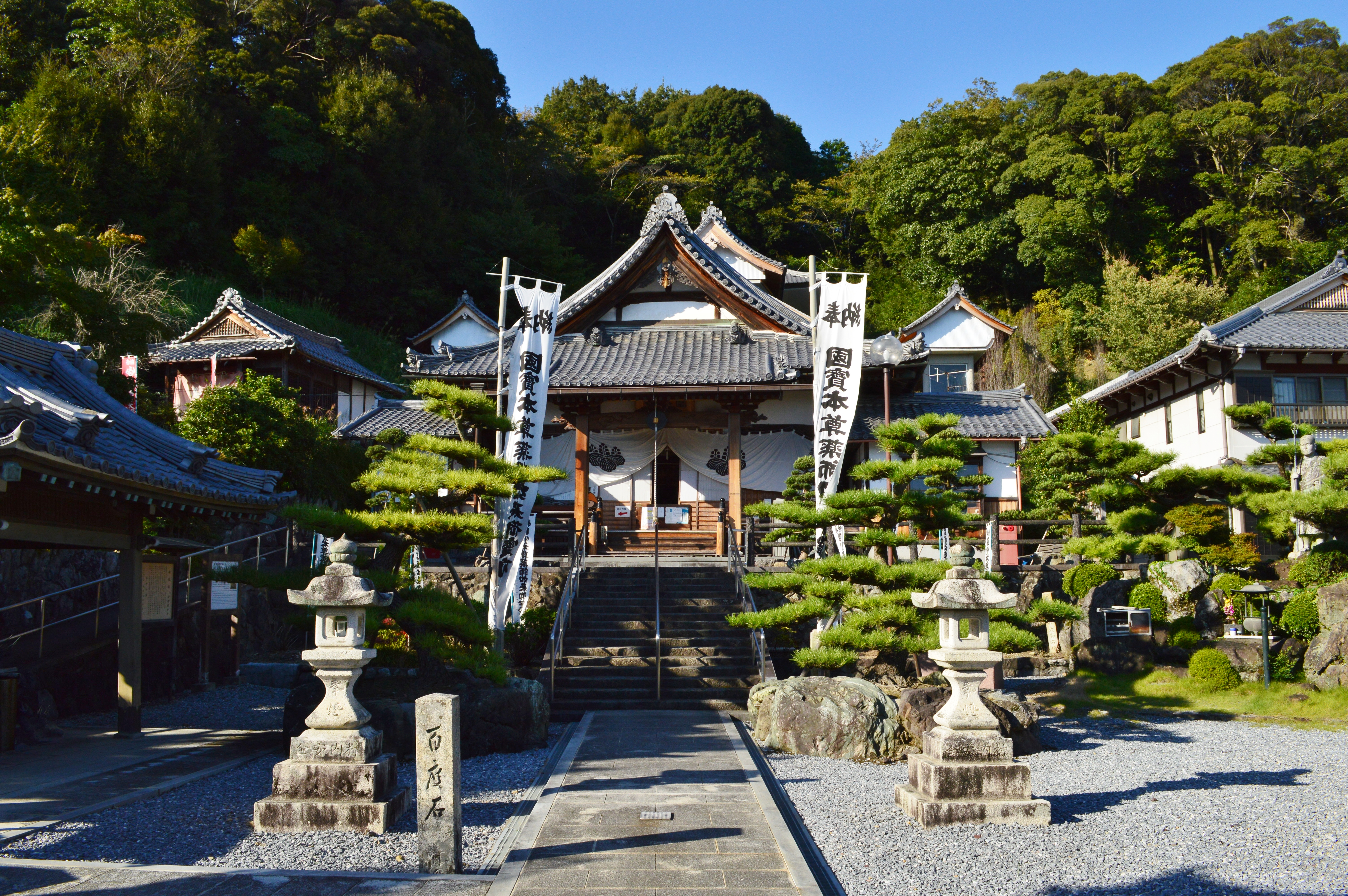 美濃国分寺 本堂